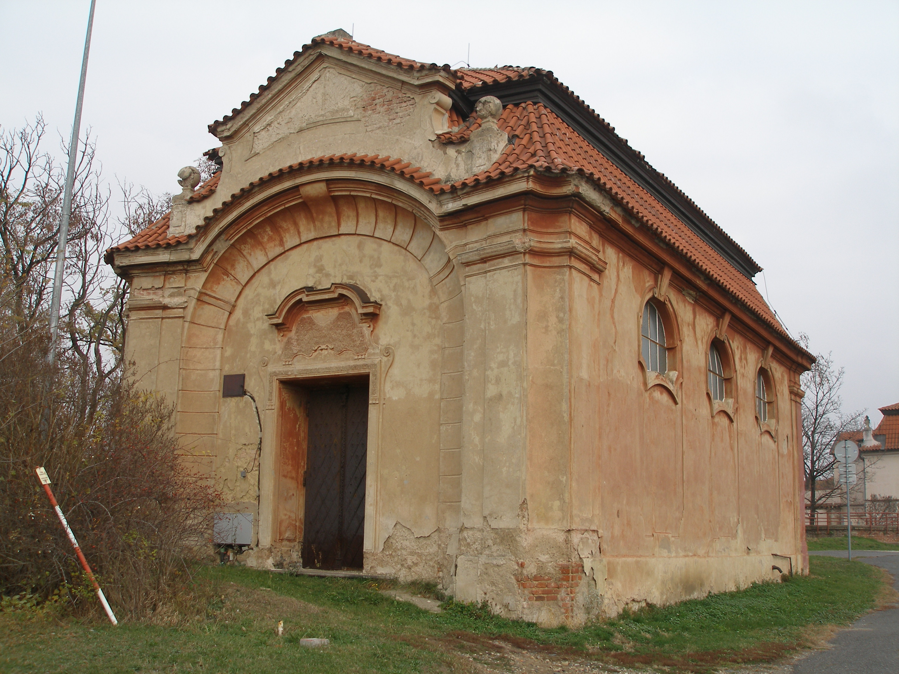 Špýchar u usedlosti Rokoska v areálu pražské nemocnice Bulovka.